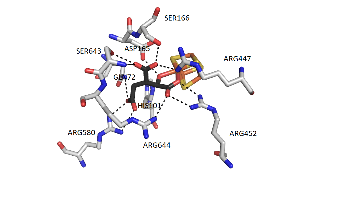 Ilustración del centro activo de aconitasa con isocitrato como ligando (las interacciones con los puentes de hidrogeno se marcan en linea de puntos).